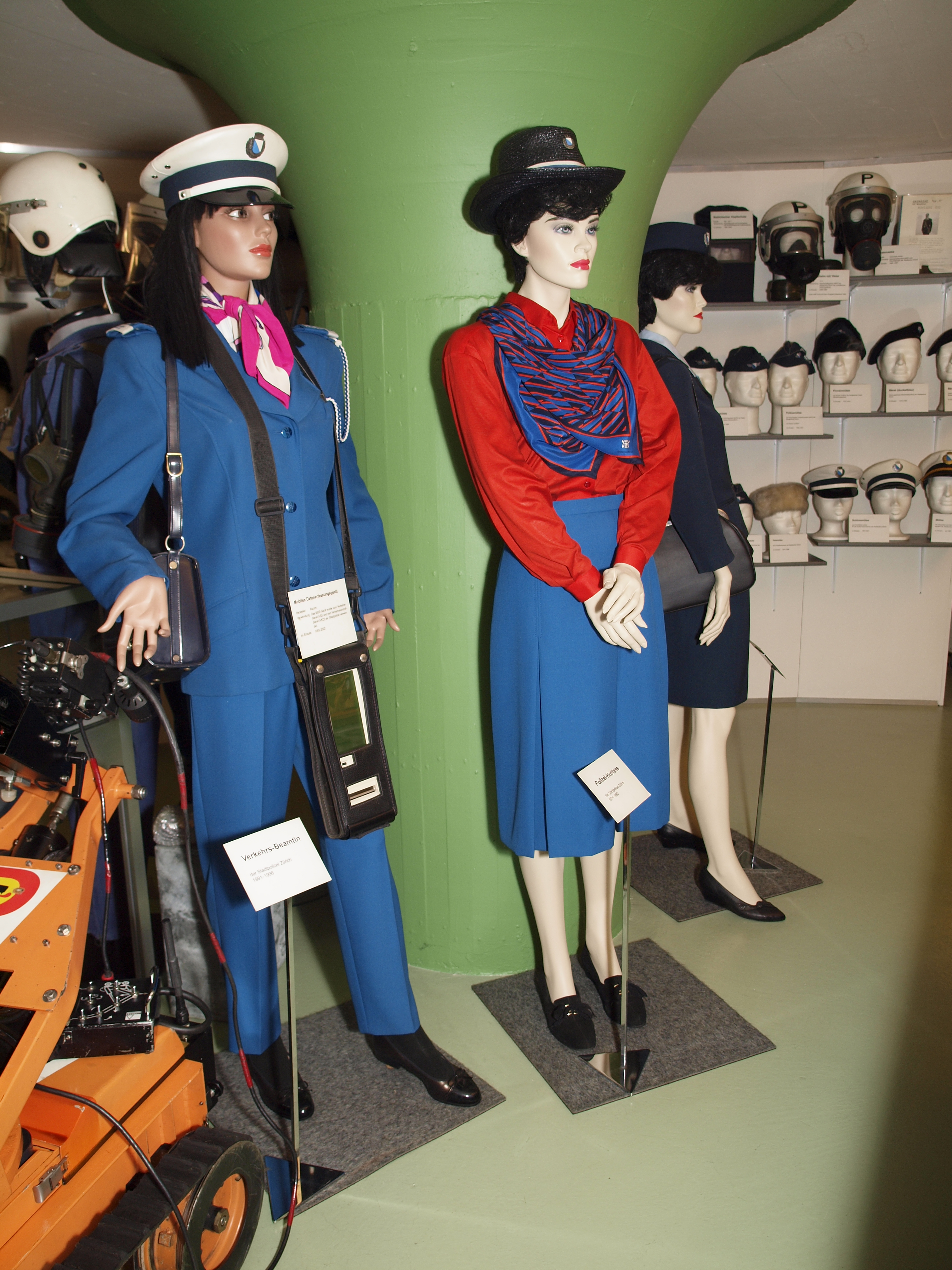 Museum der Stadtpoizei Zürich: Uniformen einer Polizei-Hostess von 1974 bis 1990 und einer Politesse von 1991 bis 1996